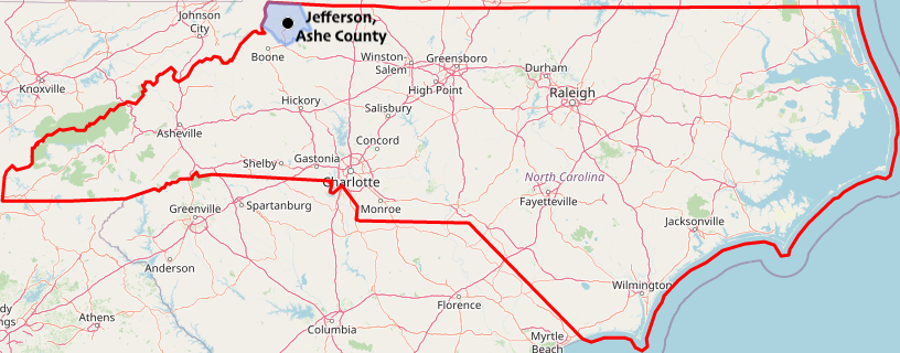 carte réalisée sur umap This map may be incomplete, and may contain errors. Don't rely solely on it for navigation.